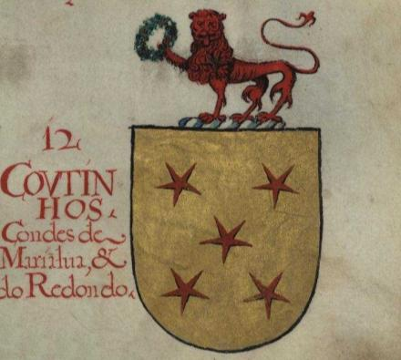 Blason des comtes de Redondo